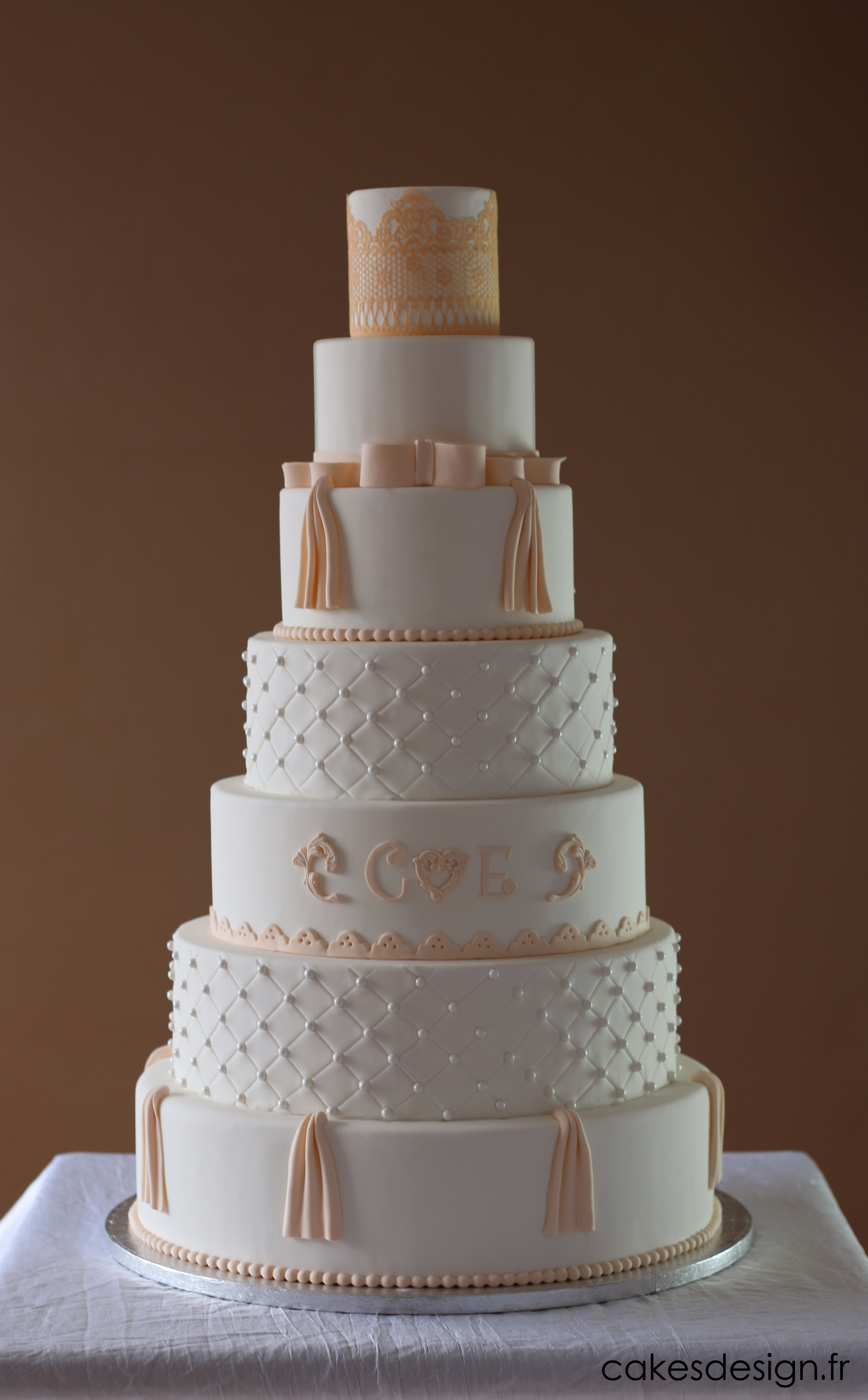 Il s'agit d'un gâteau de mariage également appelé wedding cake. Il est composé d'une base généralement fait de biscuits moelleux entrecoupé de couches de garniture. Le recouvrement est fait avec de la pâte à sucre